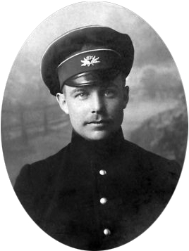 Барон Михаил Александрович Рено в бытность офицером.